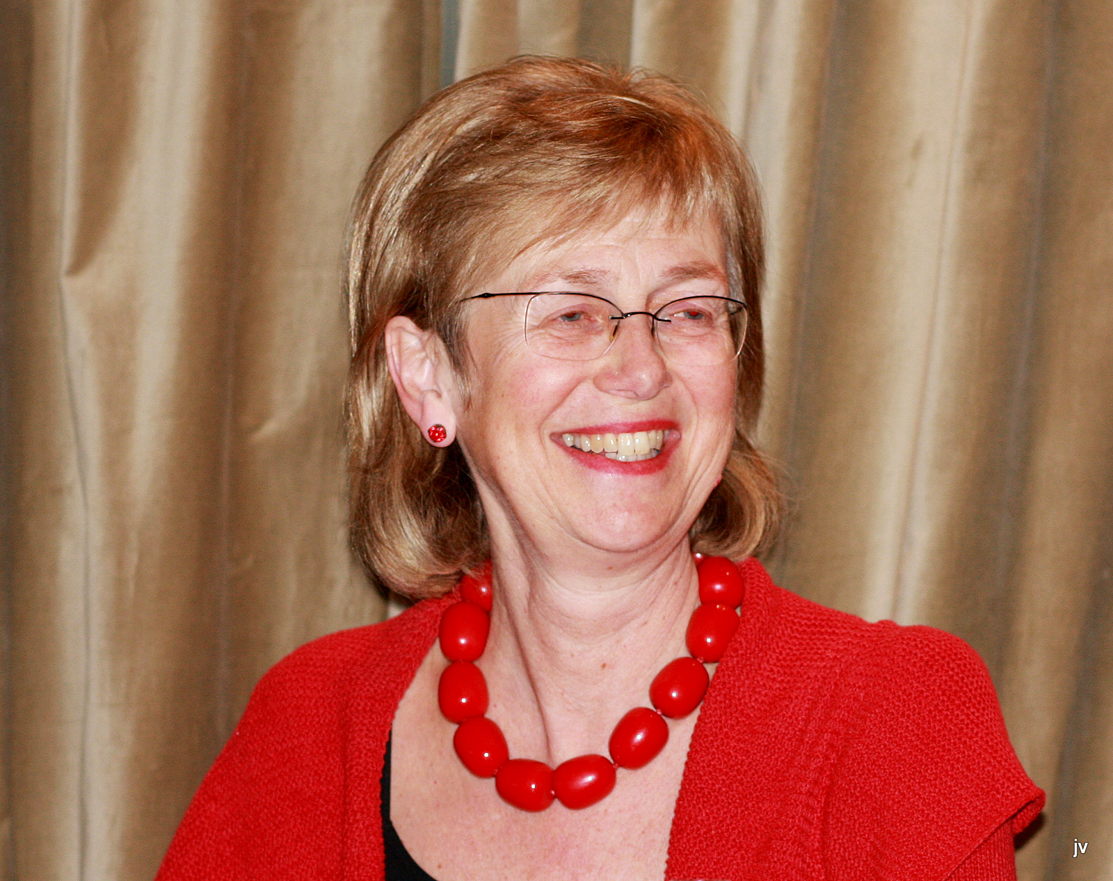 Bjørg_Tysdal_Moe, at Kultkafeen in Stavanger